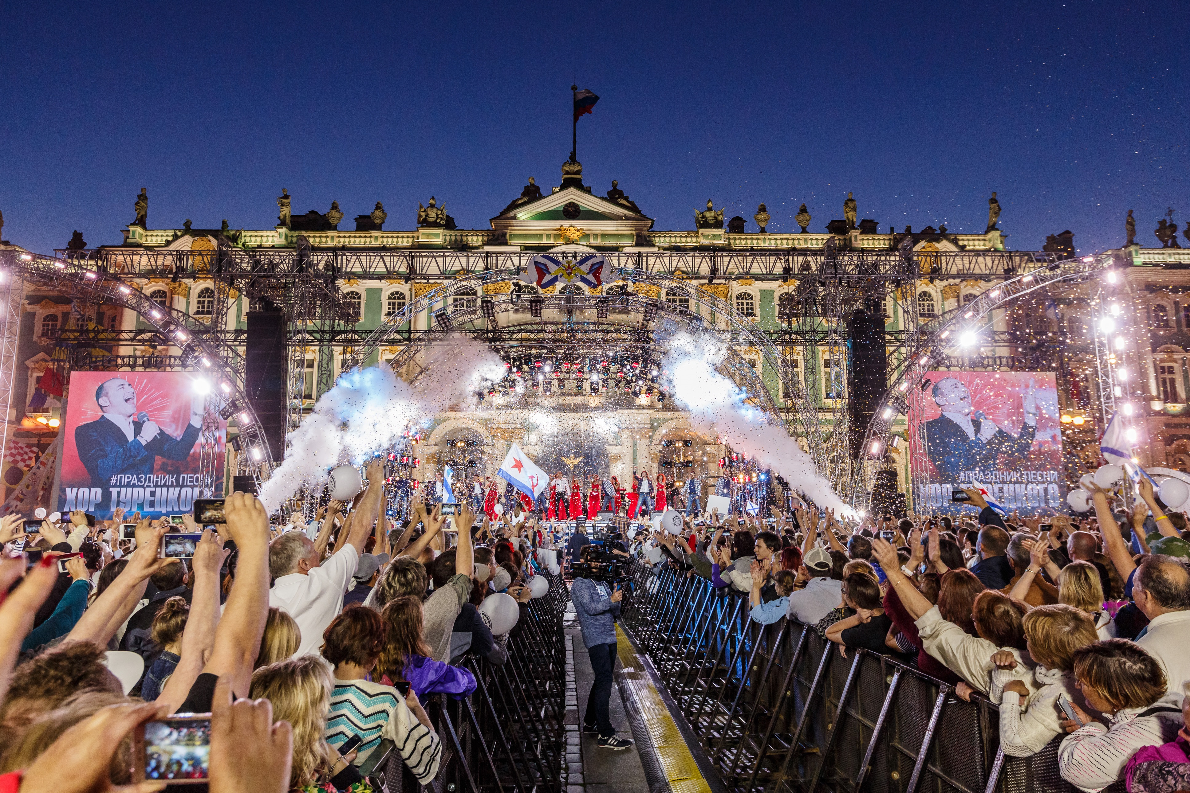 Prazdnik Pesni na Dvortsovoy Plochady 2017 Turetsky Choir